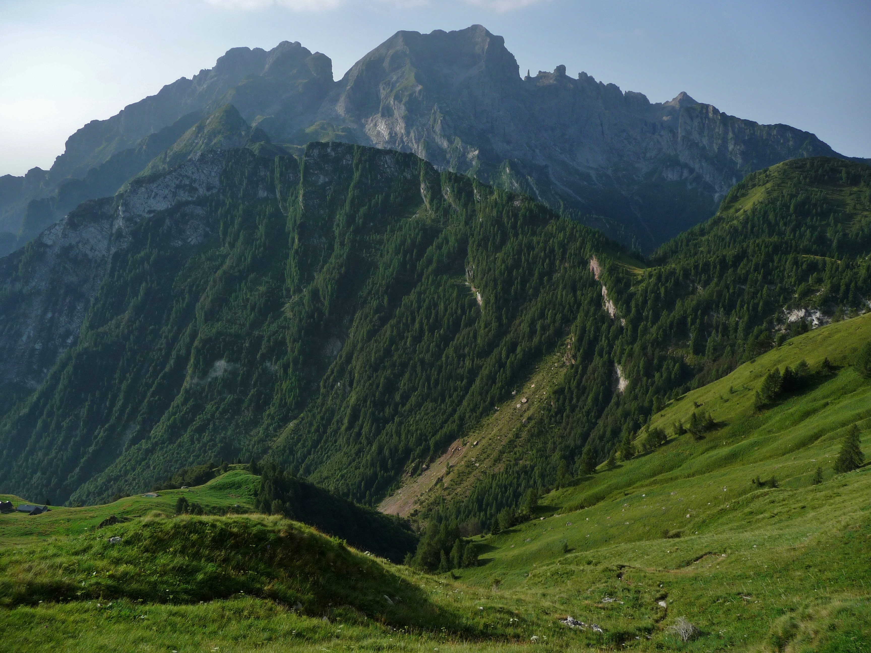 Beim morgendlichen Aufstieg über das Rif. Pian de Fontana mit Blick von Norden auf Pelf und La Schiara. Vor uns die Cime de la Scala. Dahinter ragt in Bildmitte La Schiara und links der Pelf auf. Links vor dem Pelf sieht man die Cima Nerville. Rechts am Fuß der La Schiara fällt die Felsnadel Gusela del Vescova auf.